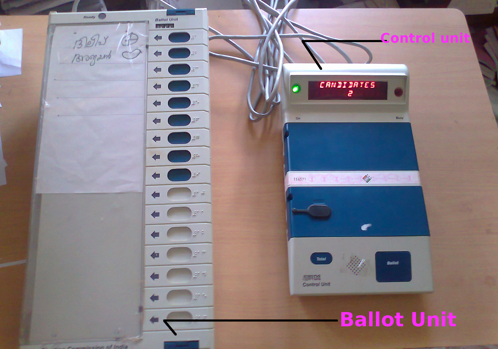 ഇലക്ട്രോണിക് വോട്ടിംഗ് മെഷീന്റെ ചിത്രം